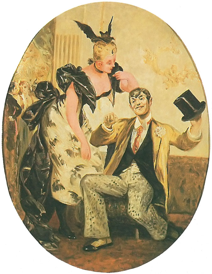 Marie Geistinger and Alexander Girardi, painting 1894